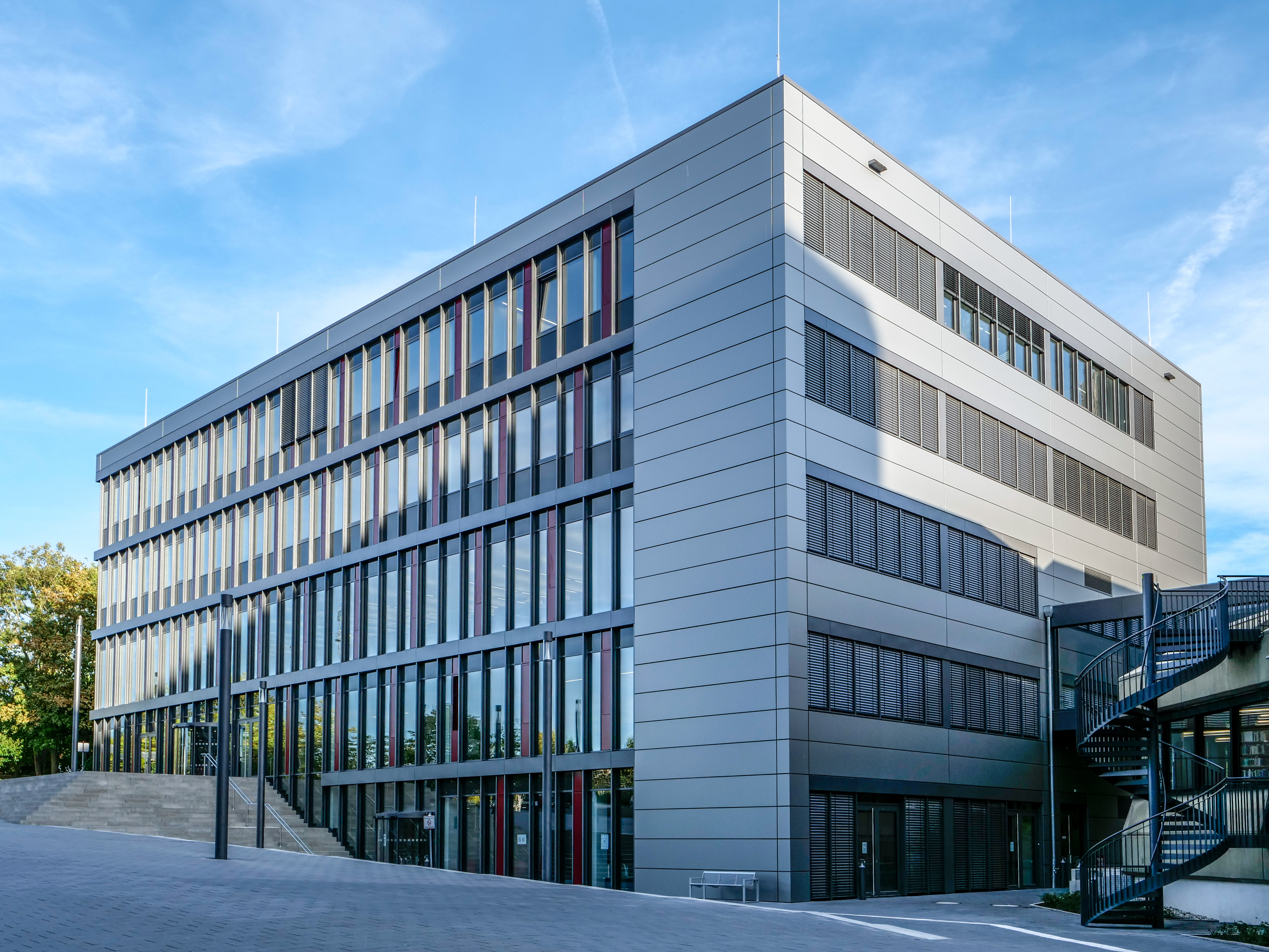 Gebäude I